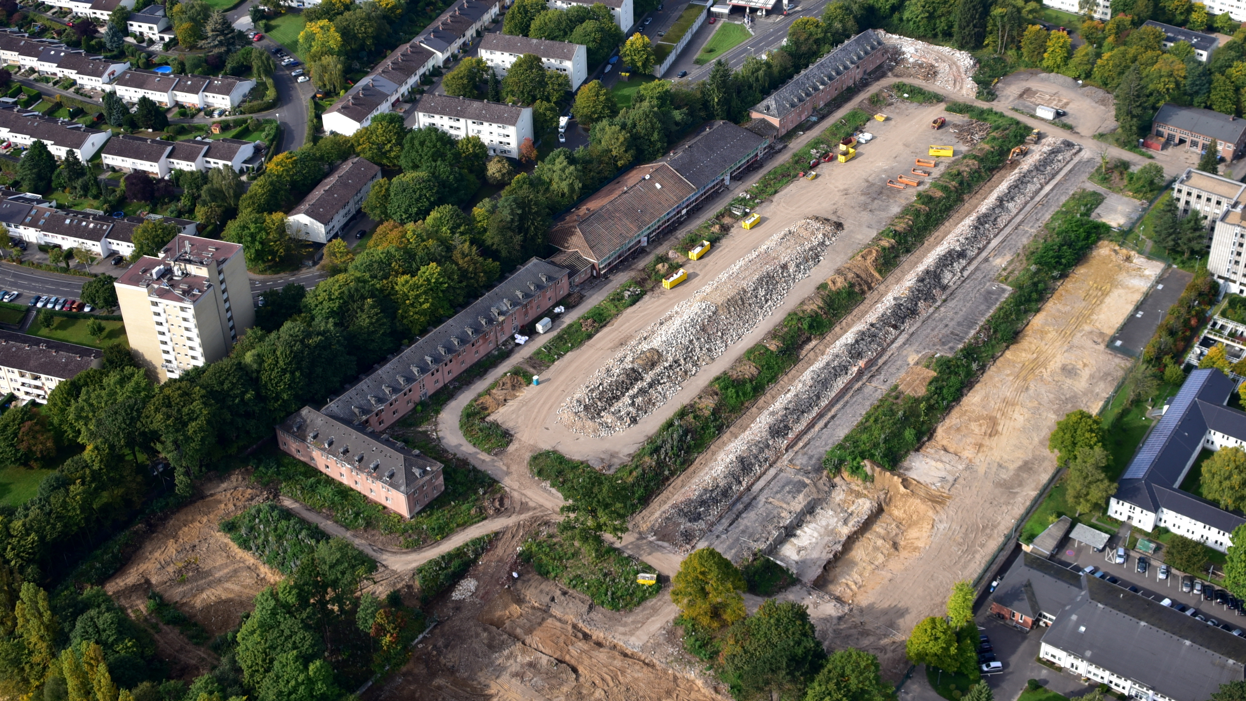 Gallwitz-Kaserne, Bonn-Duisdorf: Bereich, der 2017/18 abgerissen wurde, Luftaufnahme (2017)